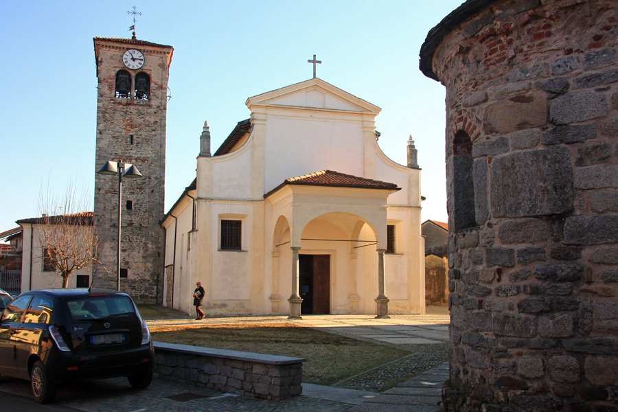 La Pieve-Parrocchiale di Santa Maria Assunta a Cureggio (NO). Sulla destra il muro del battistero romanico.